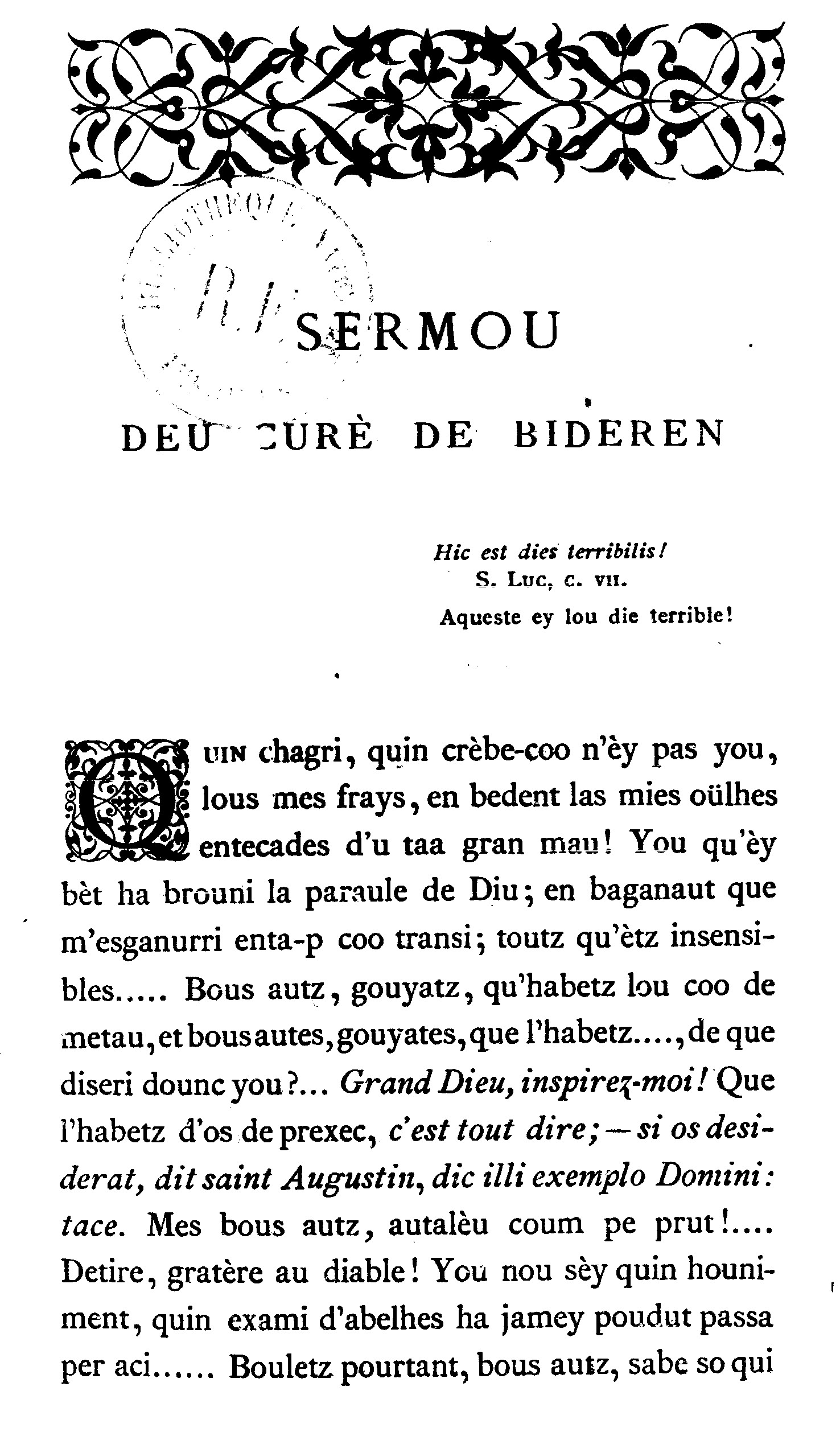 primera pagina de una edicion del siglo XIX de una obra bearnesa en occitano del siglo XVIII